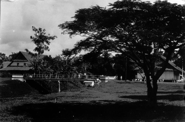 Foto. Dorpsgezicht te Tondano, noord-Celebes.